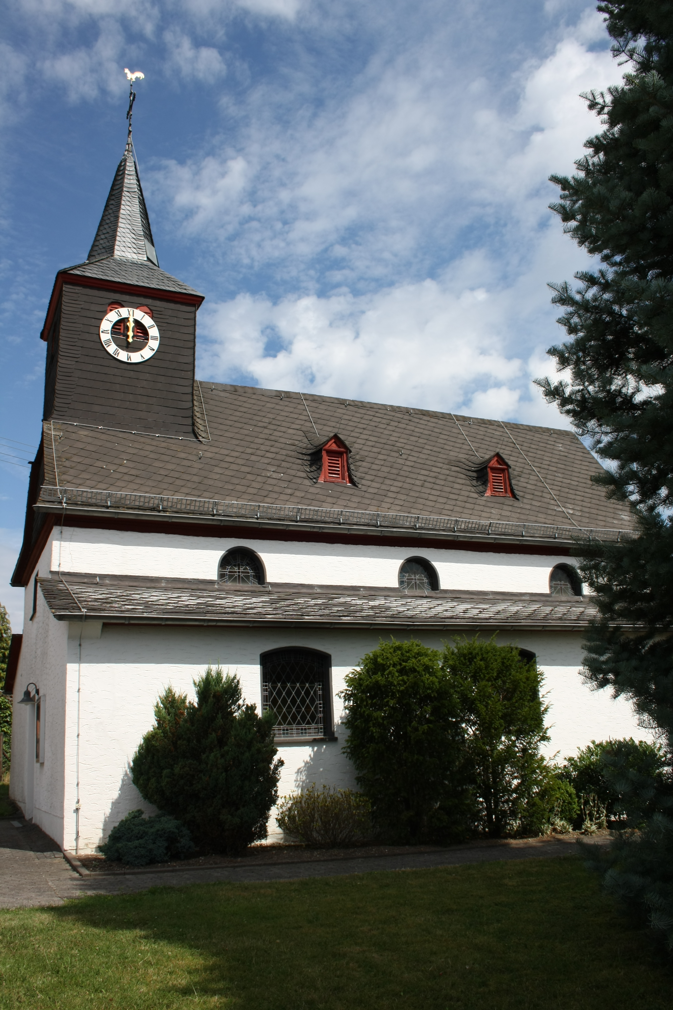 katholische Kirche St. Antonius in Berg (bei Ahrweiler), Außenaufnahme